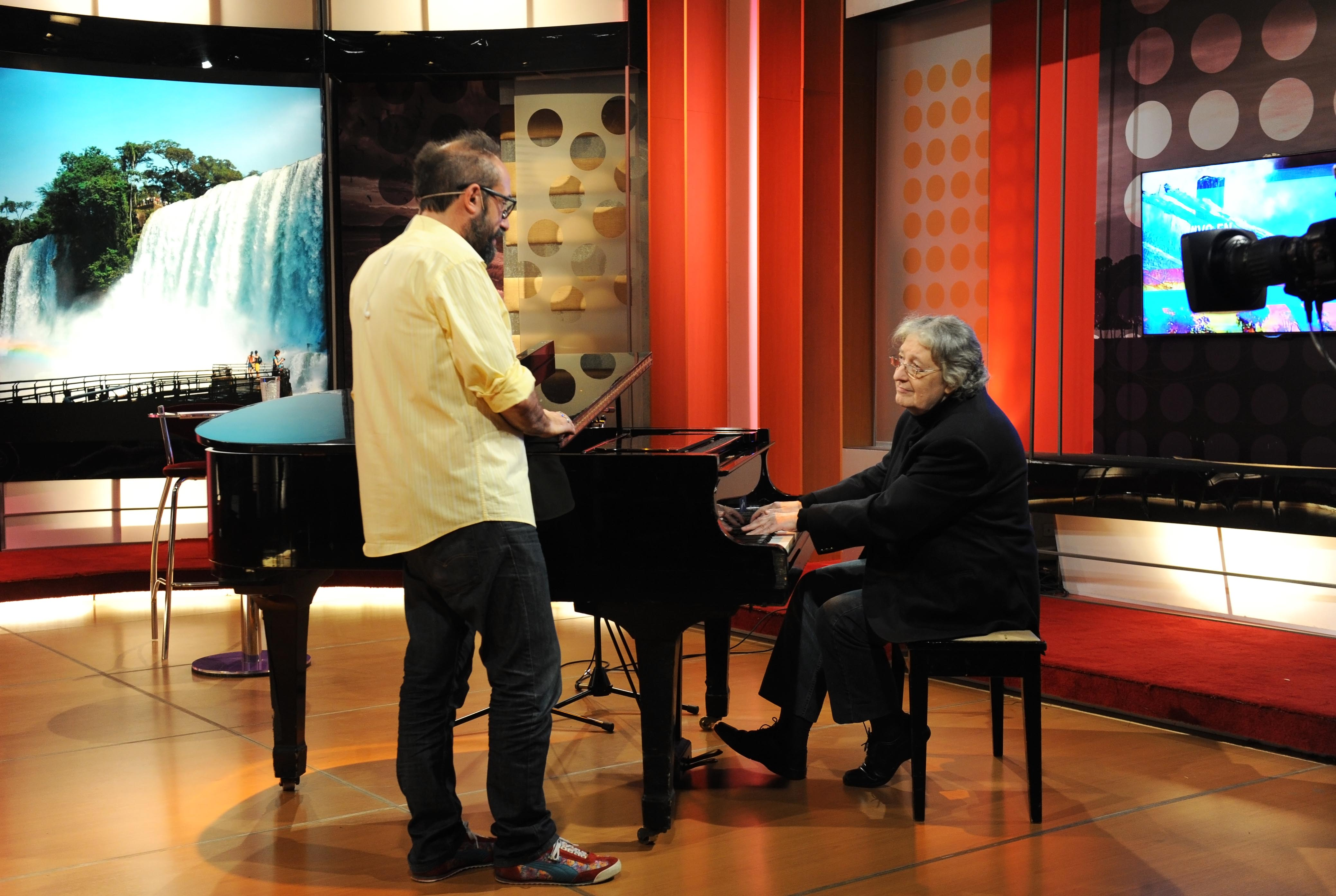 José Pablo Feinmann.